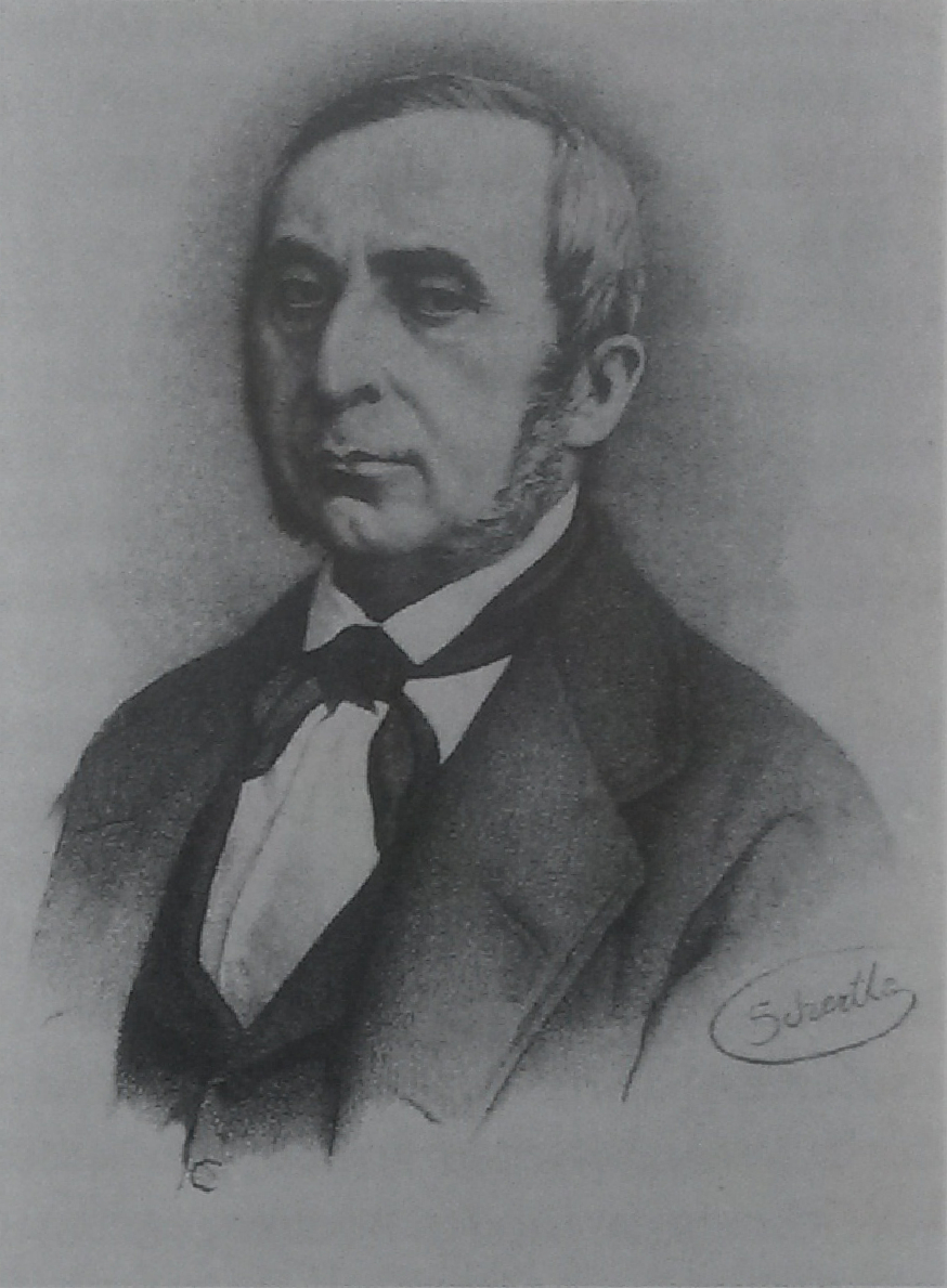 Wolfgang Neukirch, Frankfurter Politiker (1815-1877)